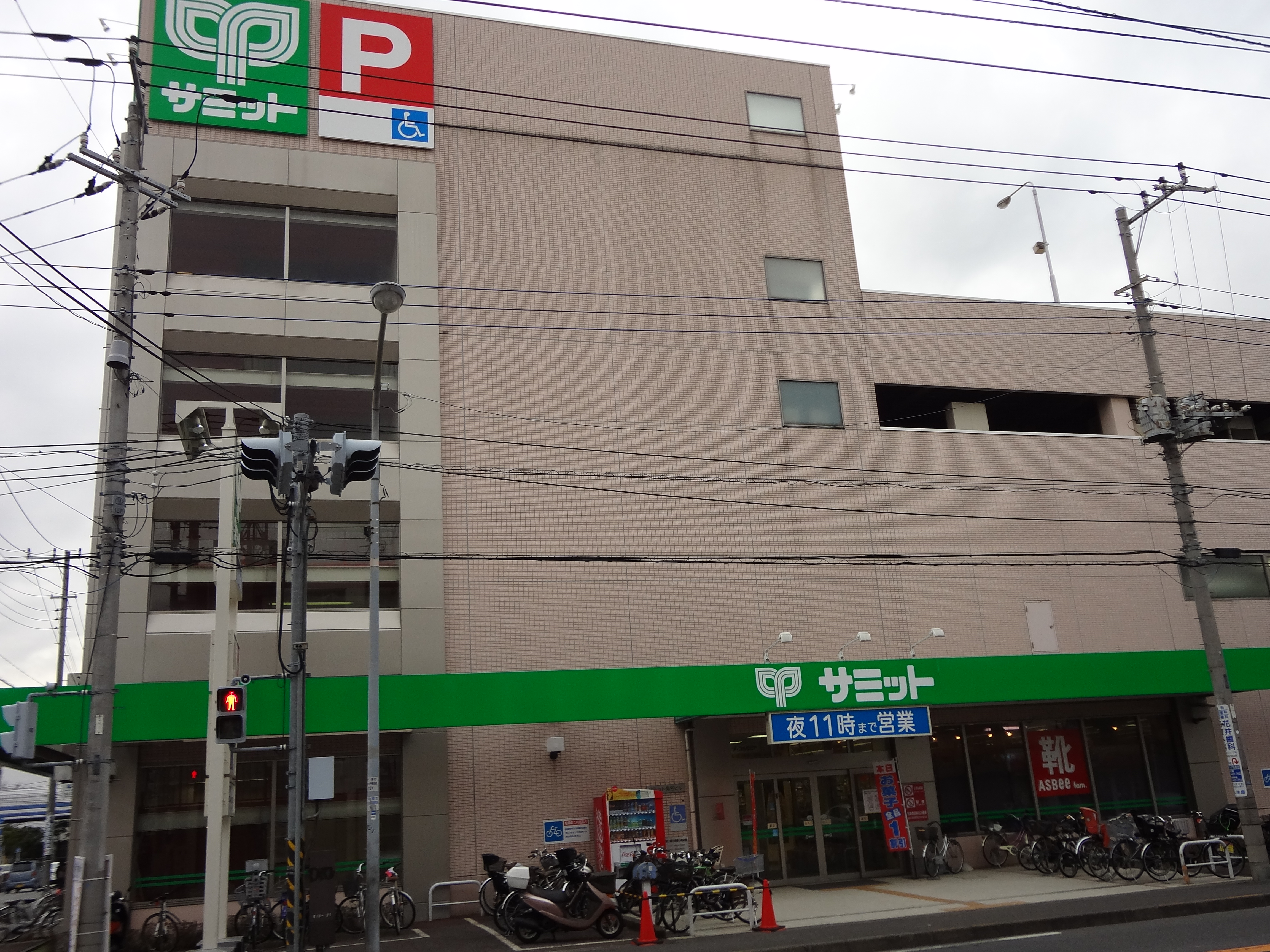 サミットストア（2016年1月23日）